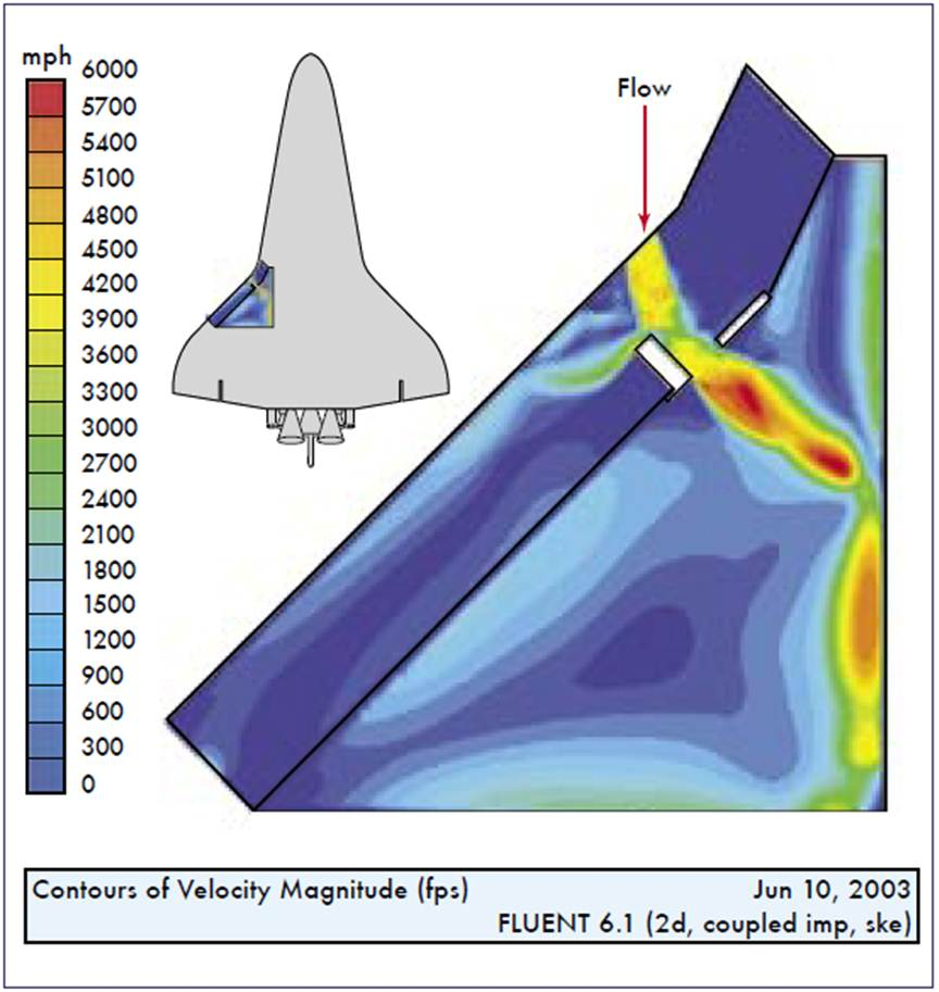 Modélisation de la vitesse du plasma s'engouffrant dans l'aile gauche de de la navette spatiale lors de la destruction de Columbia (STS-107).